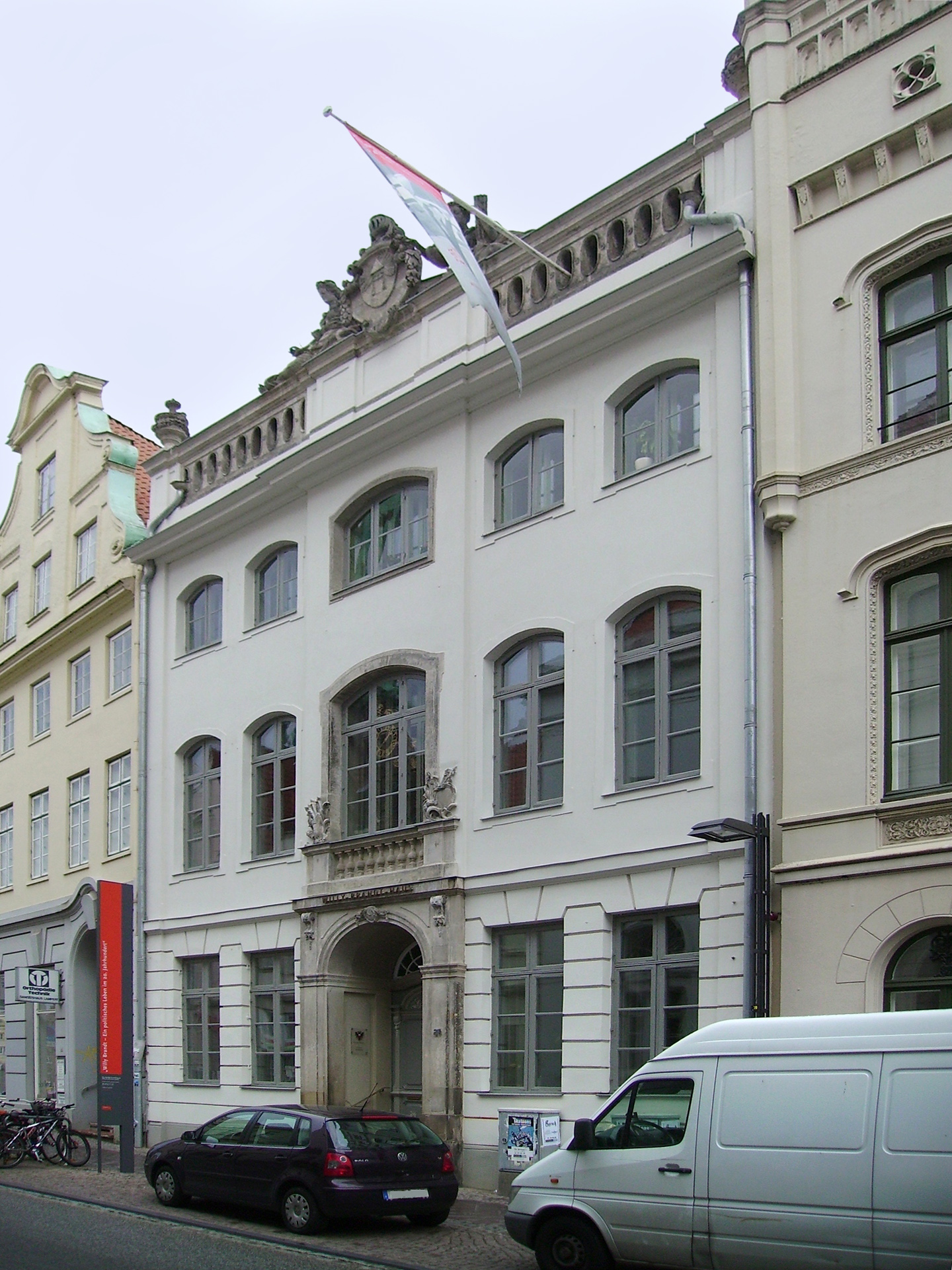 Willy-Brandt-Haus in Lübeck in der Königstraße